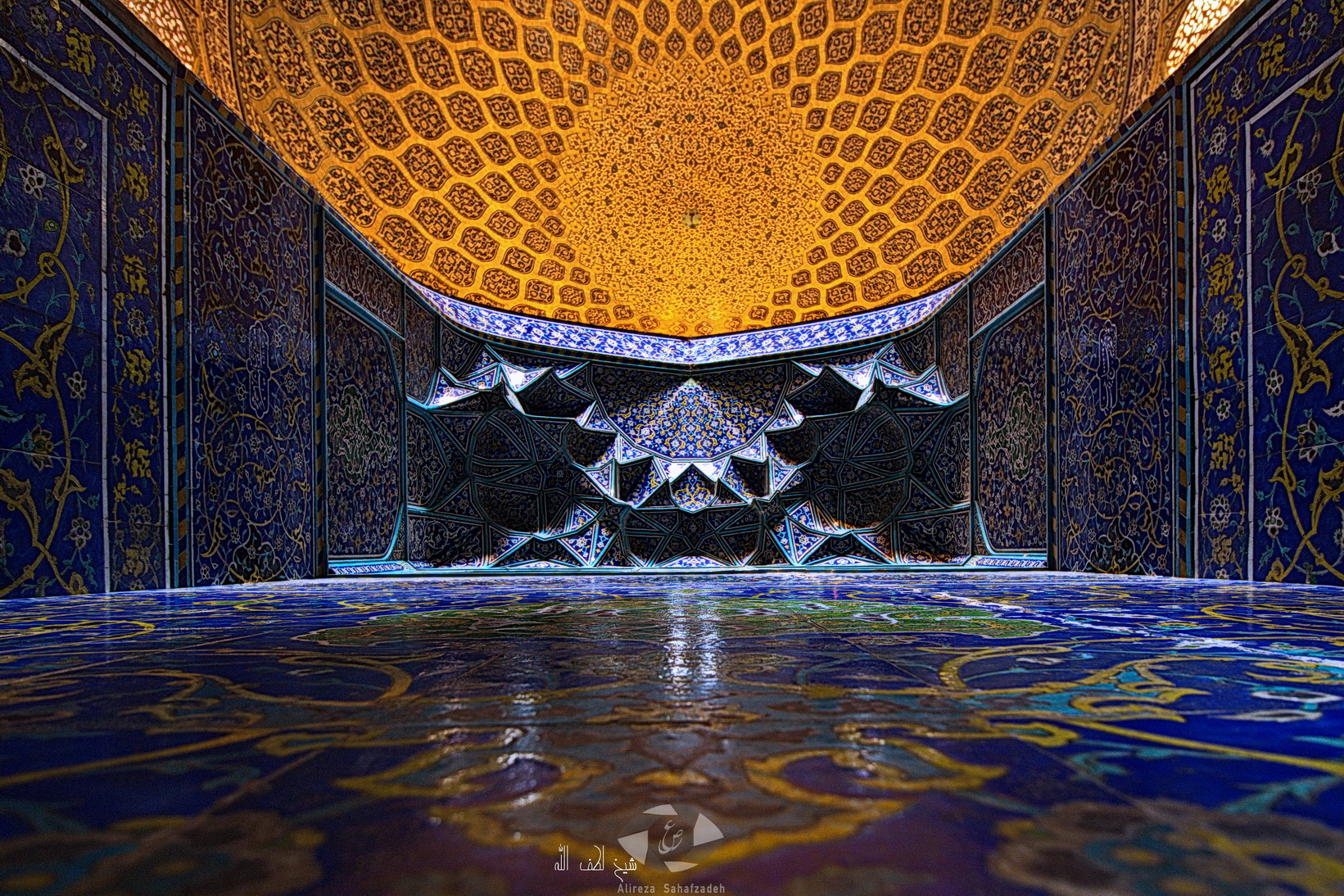 مسجد شیخ لطف الله